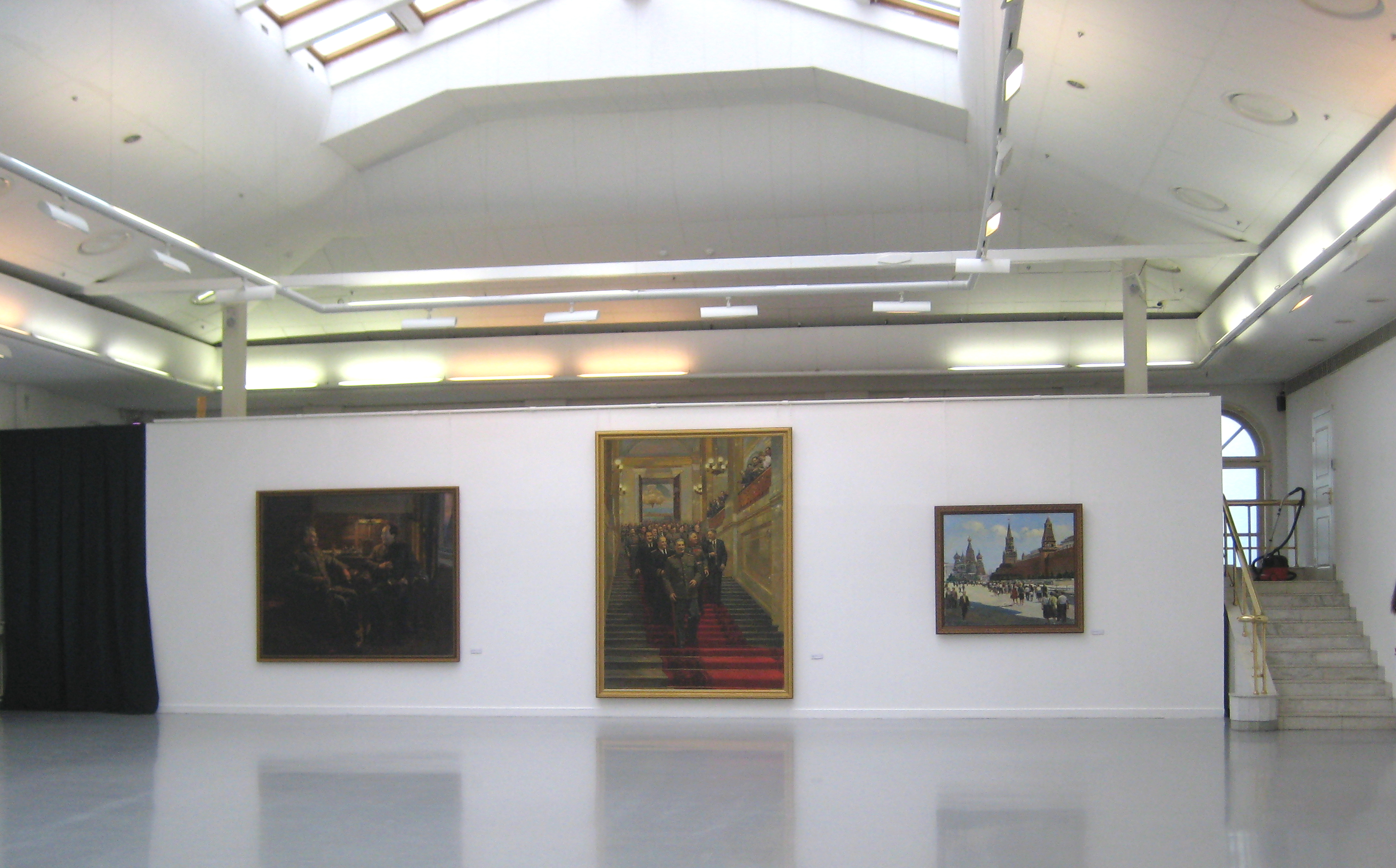 Новый Манеж. Интерьер. Выставка Налбандяна